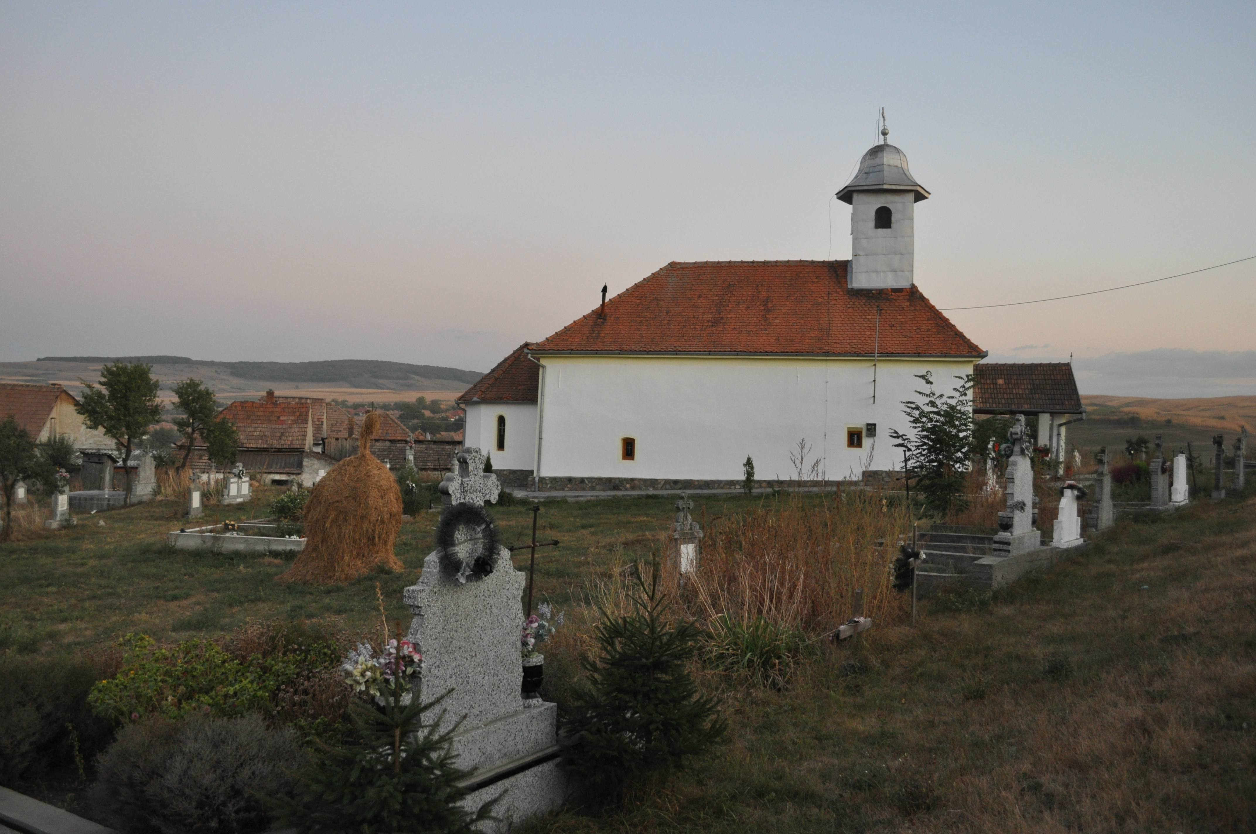 Biserica „Pogorârea Sf.Duh” din Daia Română, județul Alba